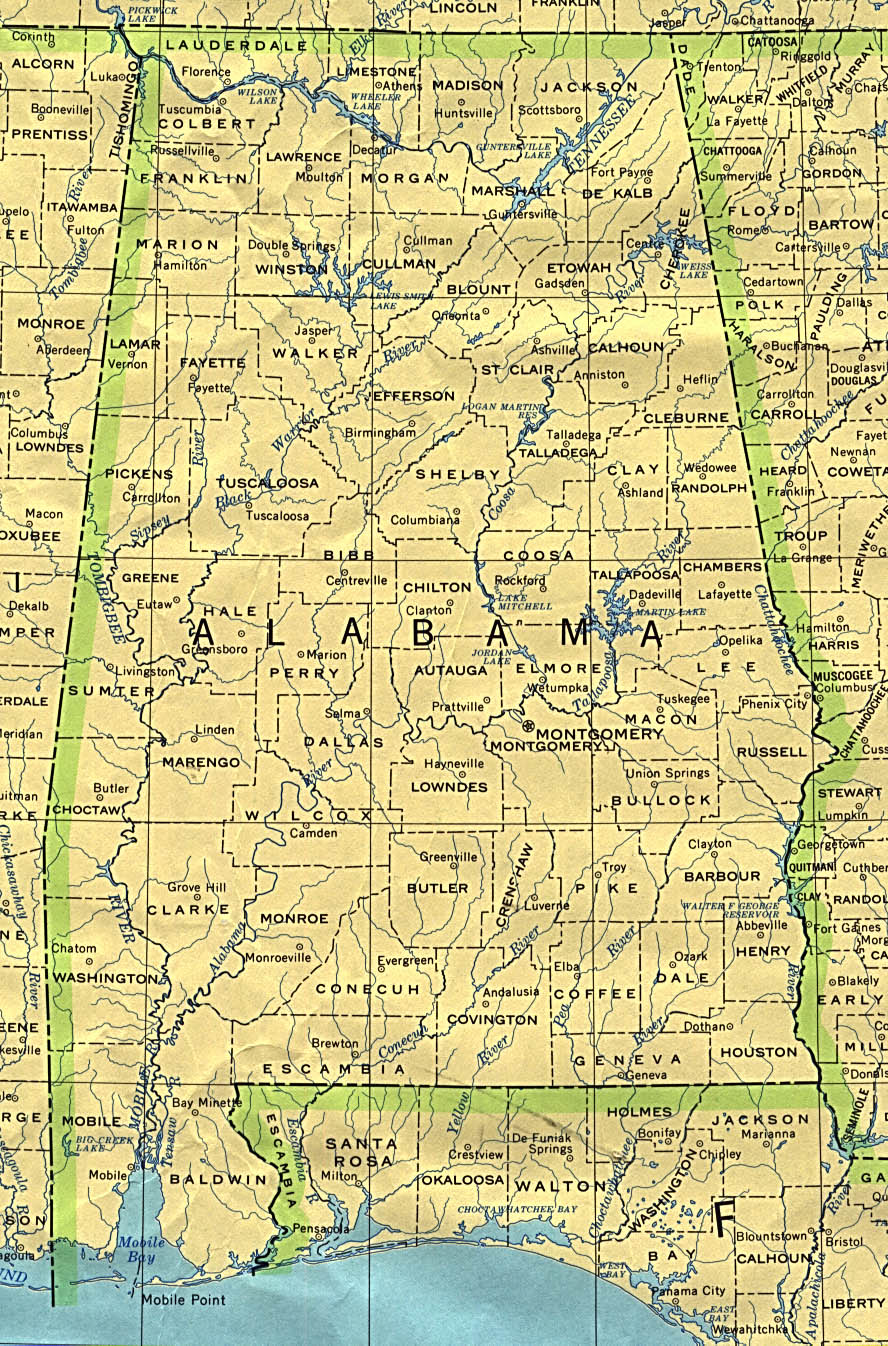 Karte Alabamas im Maßstab 1:250.000 aus der Perry Castaneda Lib.